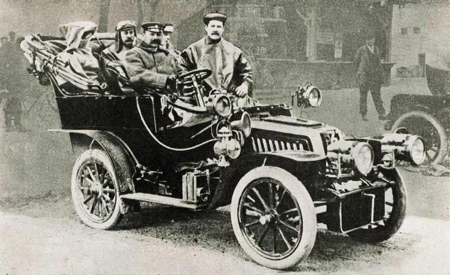 Georges Cormier vainqueur de la Coupe du Loiret 1905 (2 000 kilomètres), sur voiture de Dion - La Vie au Grand Air du 2 juin 1905, p.VII